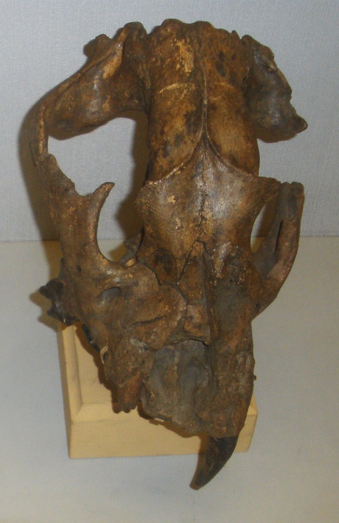 Fossil of Panthera, an extinct mammal- Took the picture at Museo di Paleontologia di Firenze